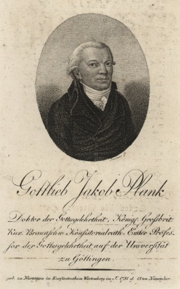 Gottlieb Jakob Planck